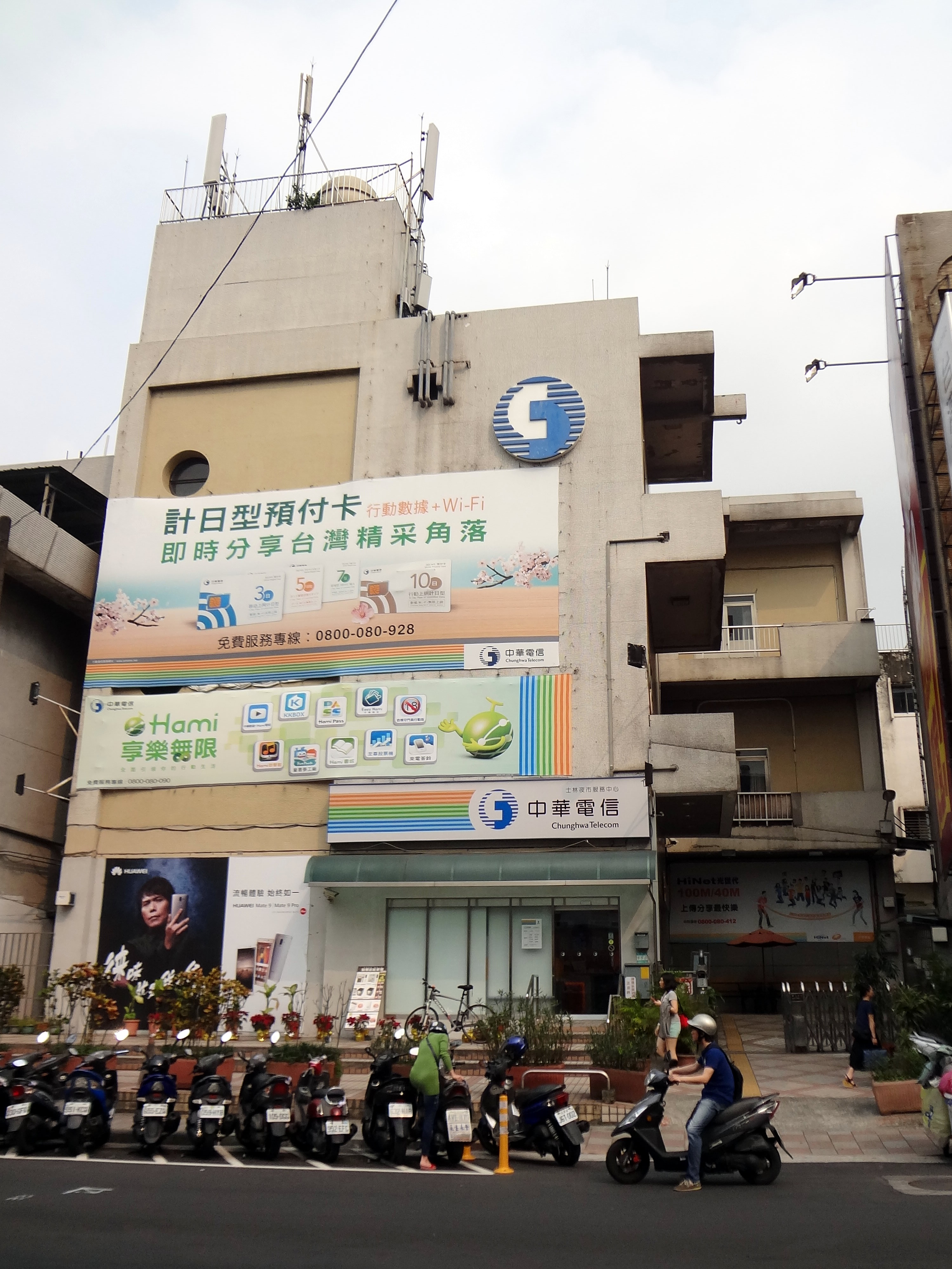 中華電信士林夜市服務中心，位於臺北市士林區文林路158號。